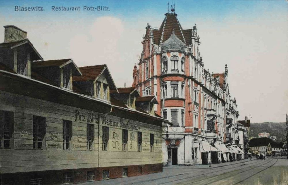 La calle.